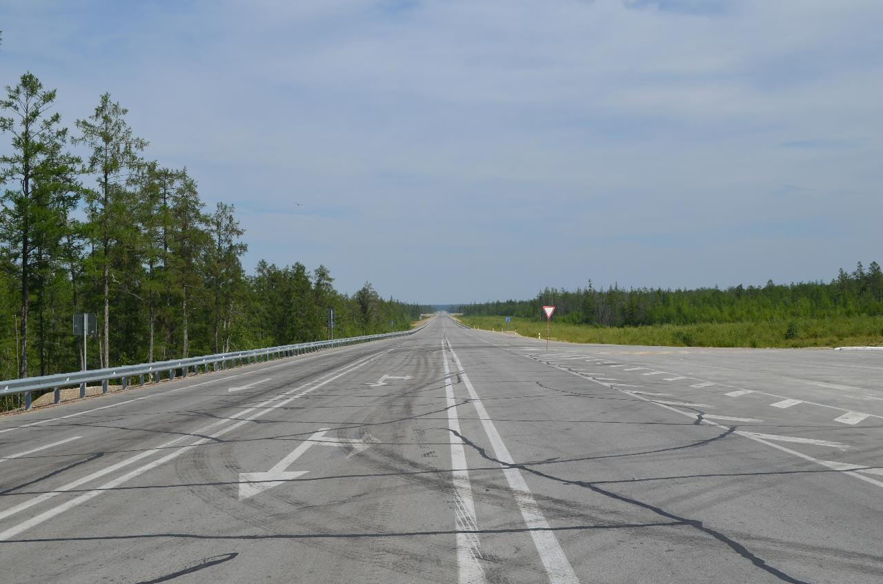 Автодорога "Лена" где-то севернее Качикатцев